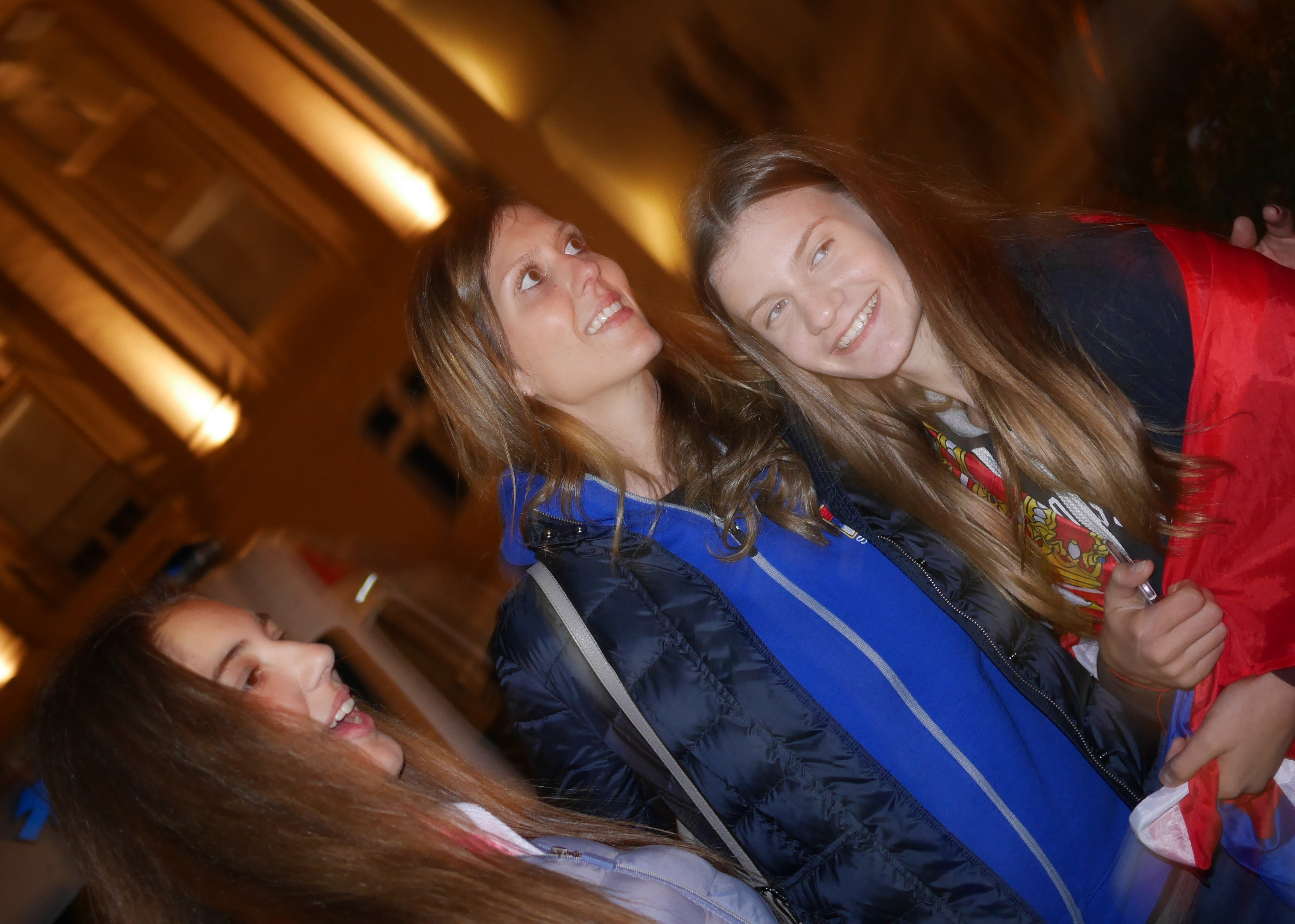 Srpski (latinica): Bojana Živković doček u Beogradu (Svetski šampioni 2018)